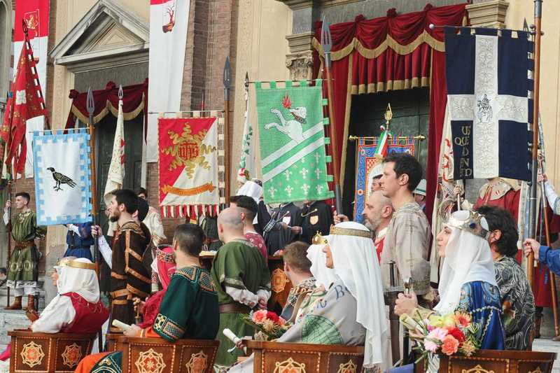 Iscrizione delle contrade al Palio di Legnano 2016